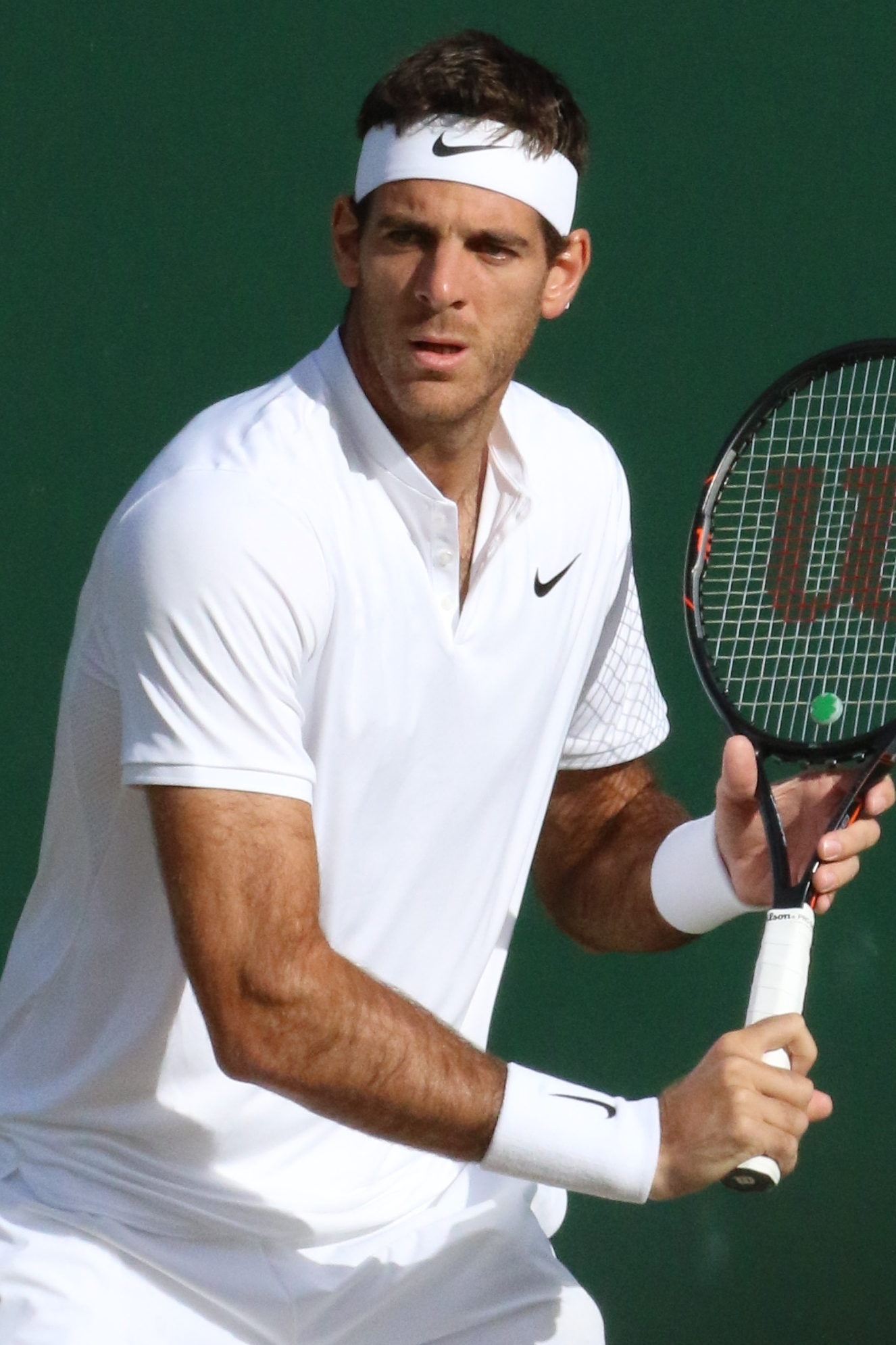 del Potro WM16 (13)